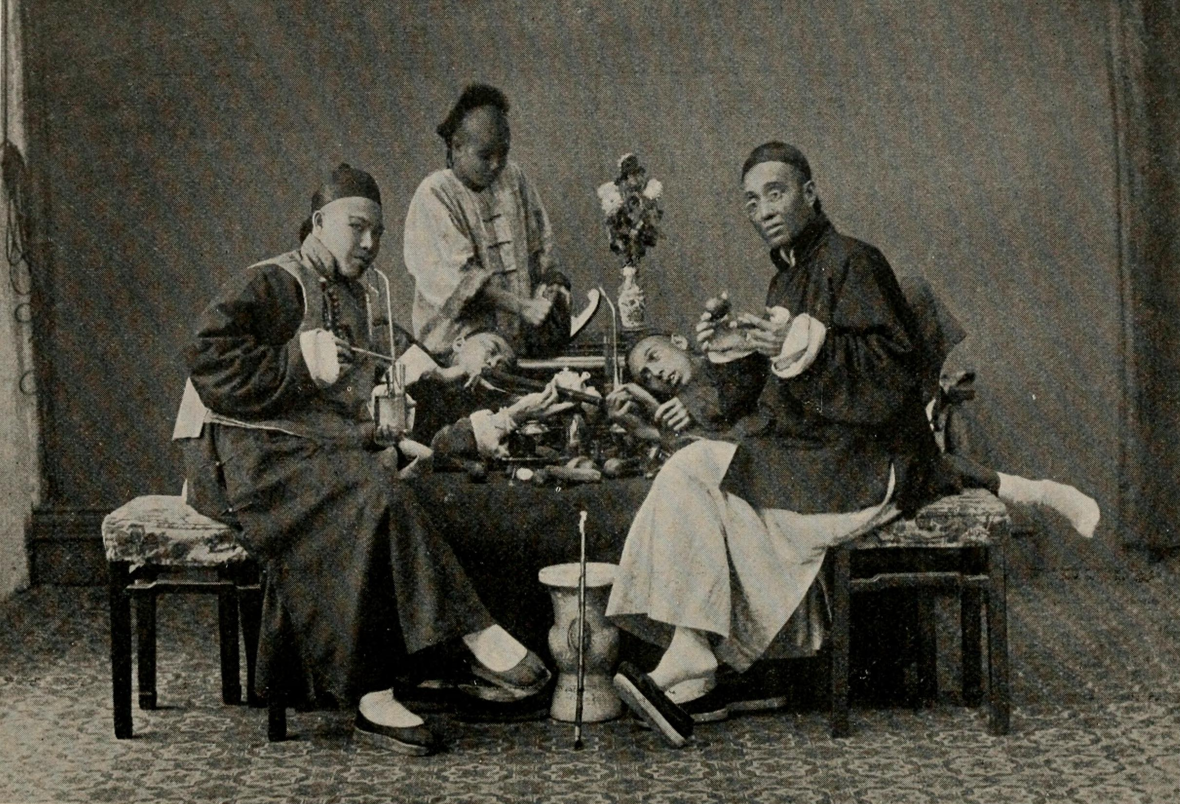 Opium smoking in China.